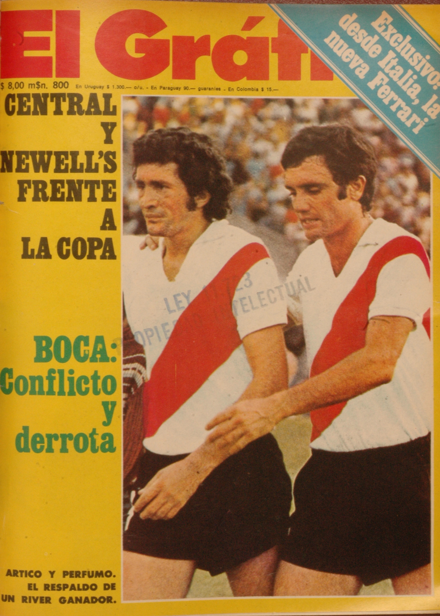 El Grafico del 26 de Febrero de 1975. Edicion 2890